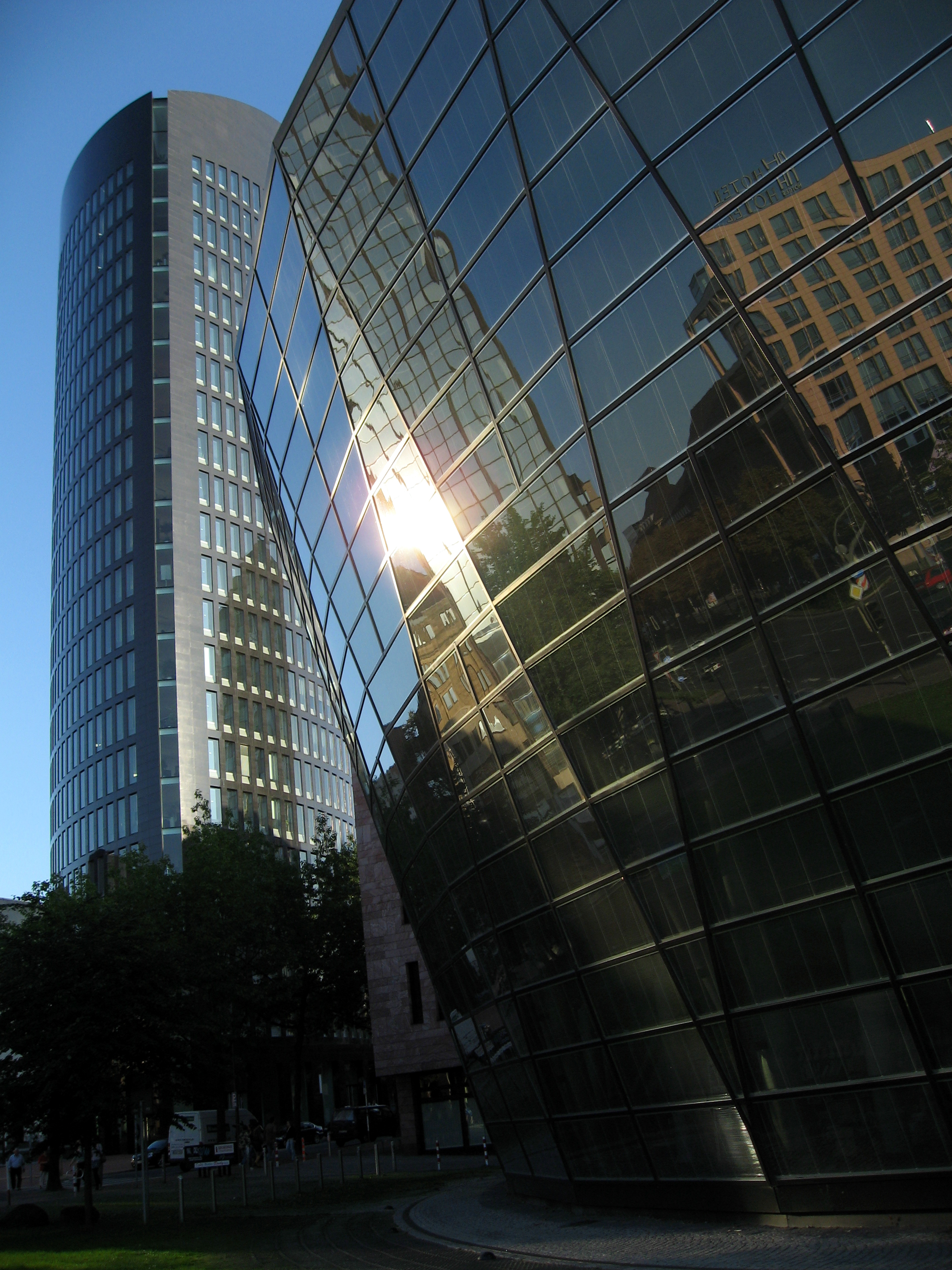 Dortmund, Bibliothek, RWI-Tower